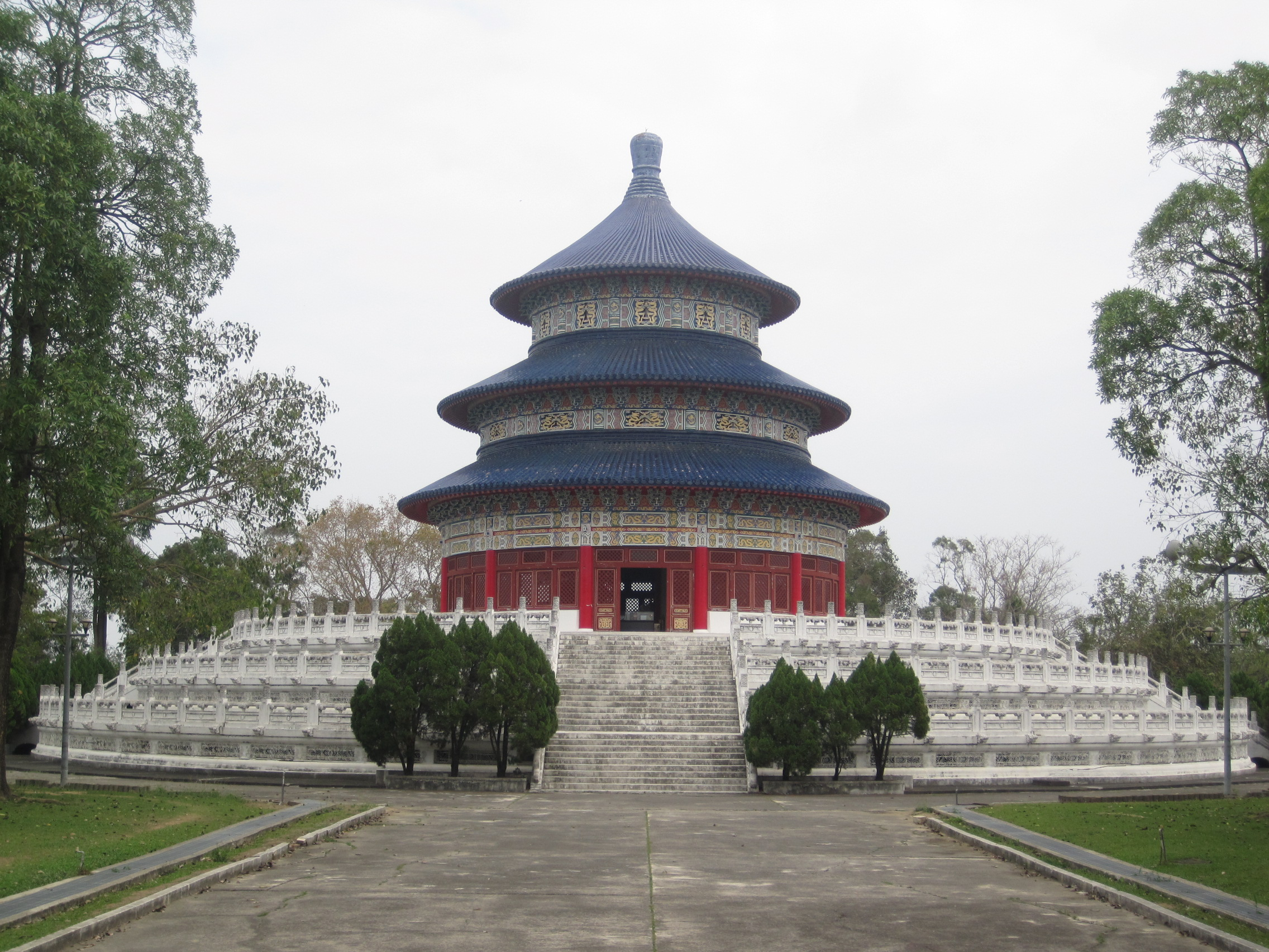 烏山頭水庫的天壇，仿造自北京天壇，只有本尊的六分之一大